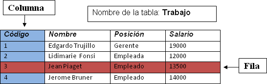 TablaRelacional